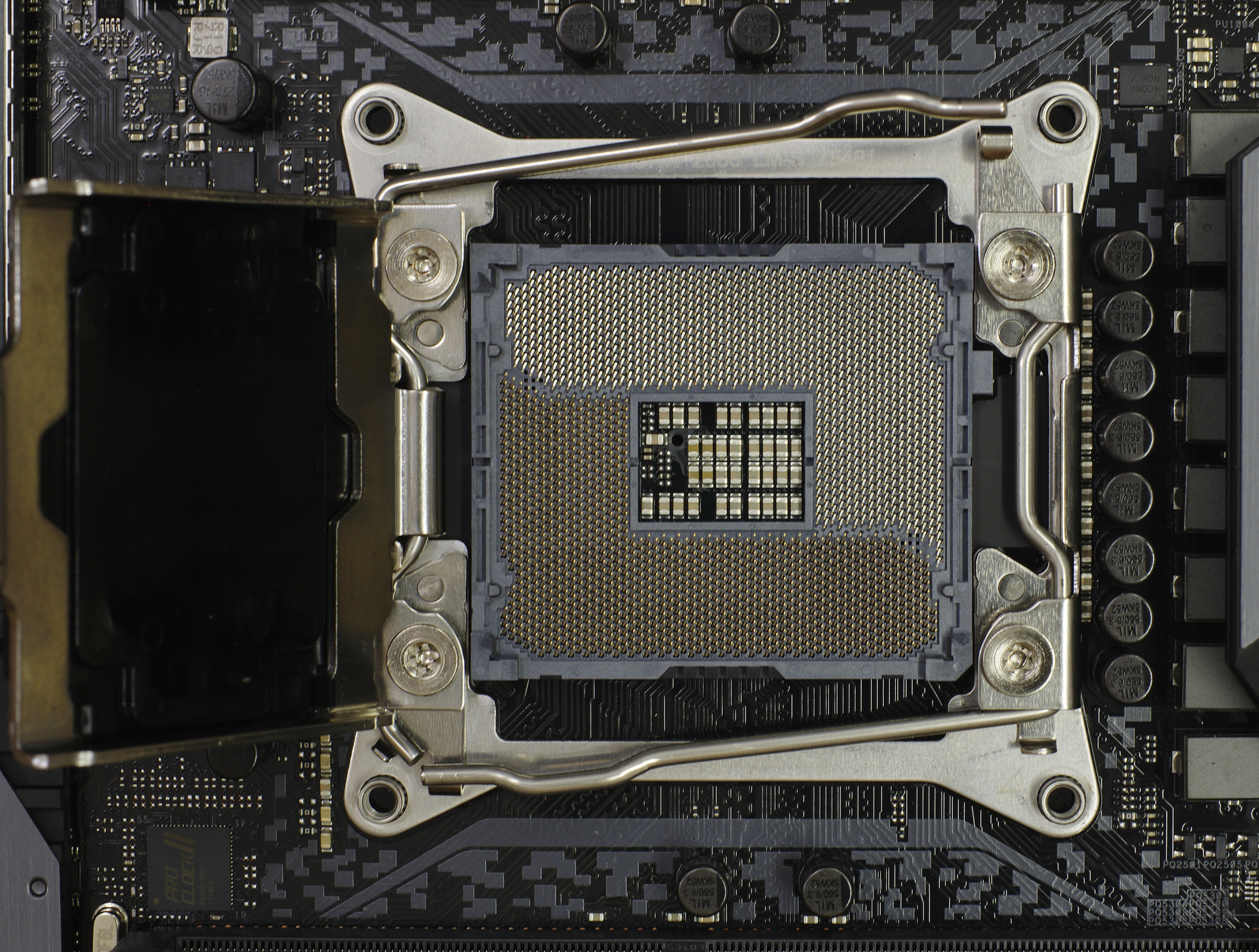 Intel Sockel 2066